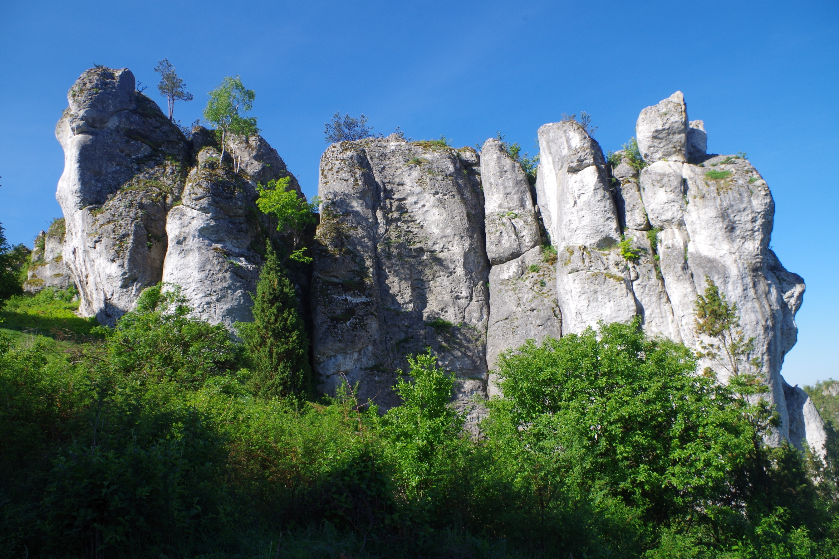 Mirowskie Skały